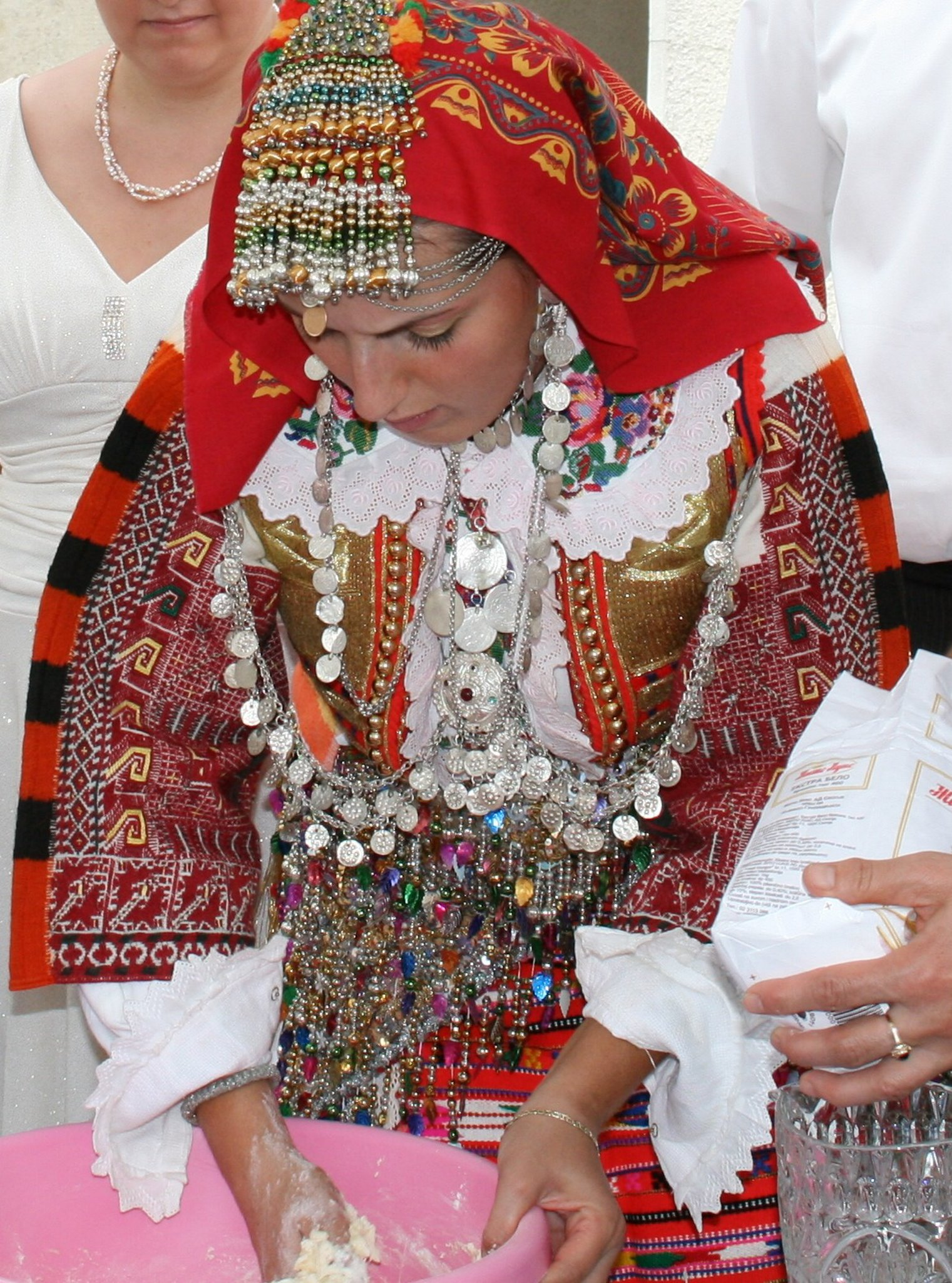 Narodna nosija od Jablanica